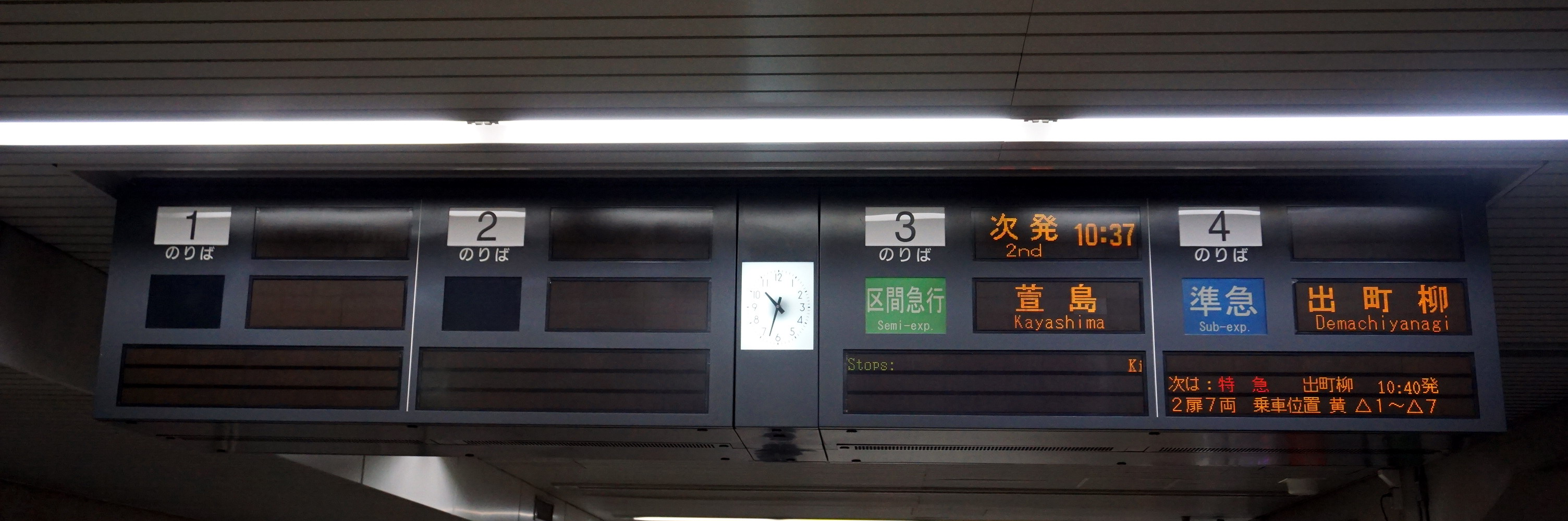 京阪淀屋橋駅の発車標